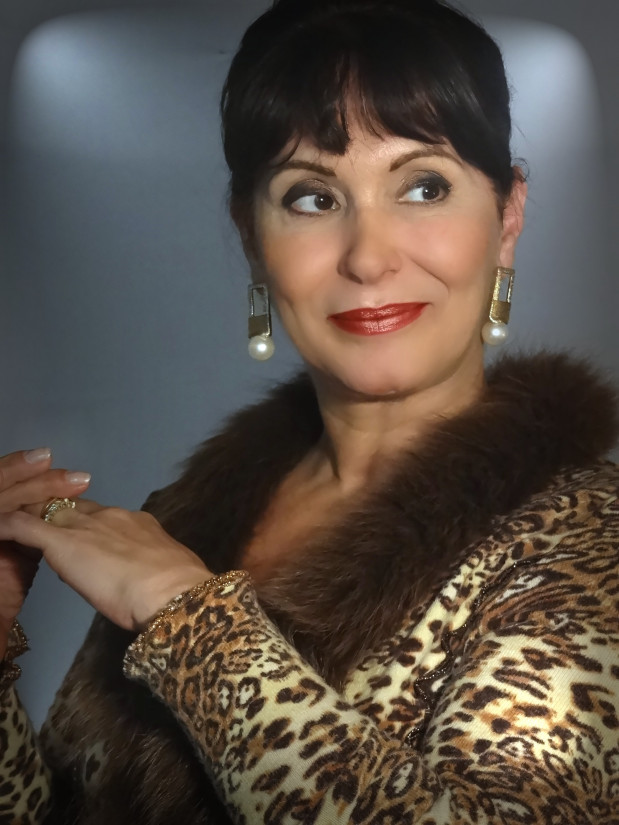 Fotografia tirada da atriz Daliléa Ayala em 2016